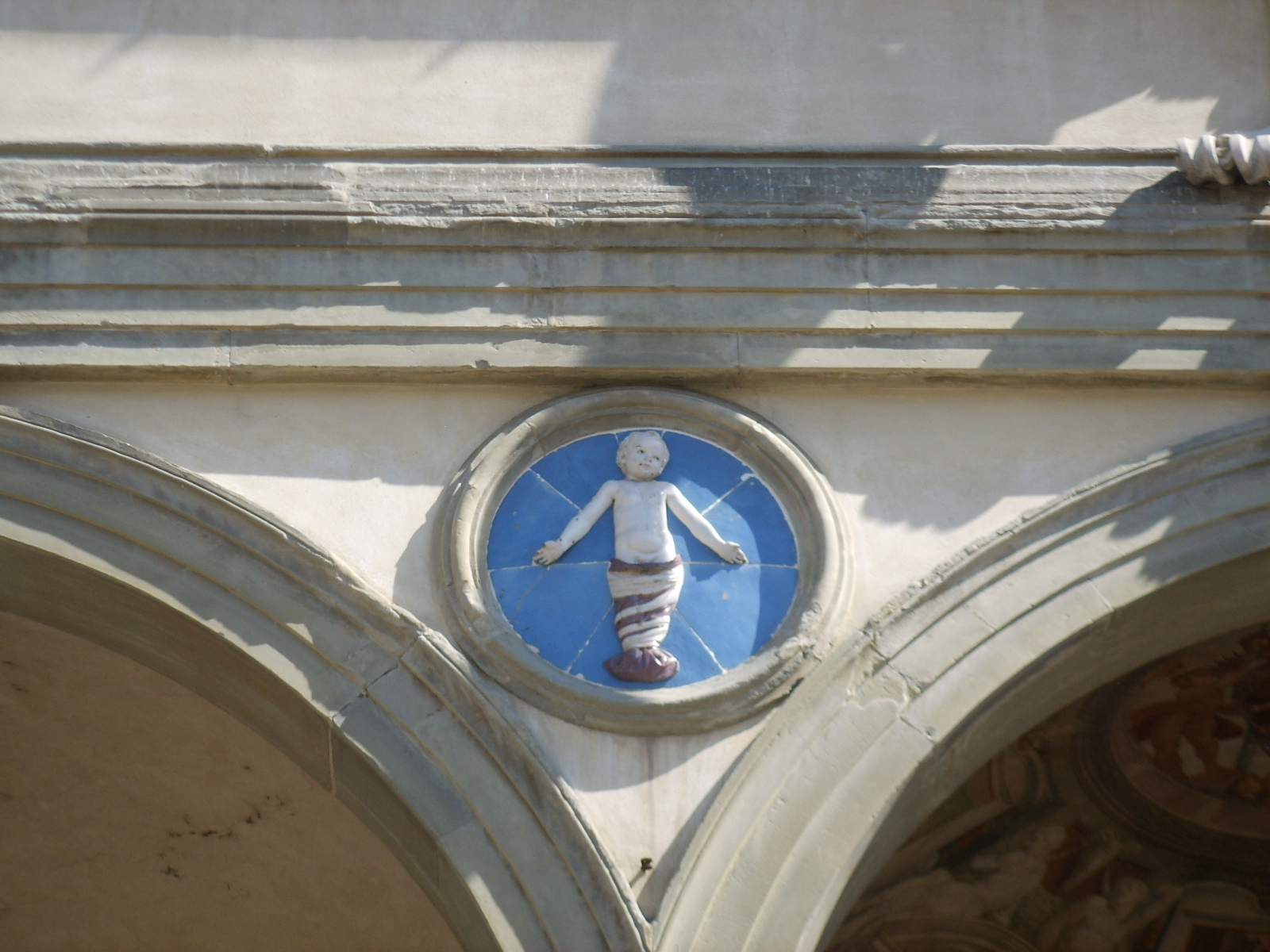 Spedale degli innocenti, tondo andrea della robbia